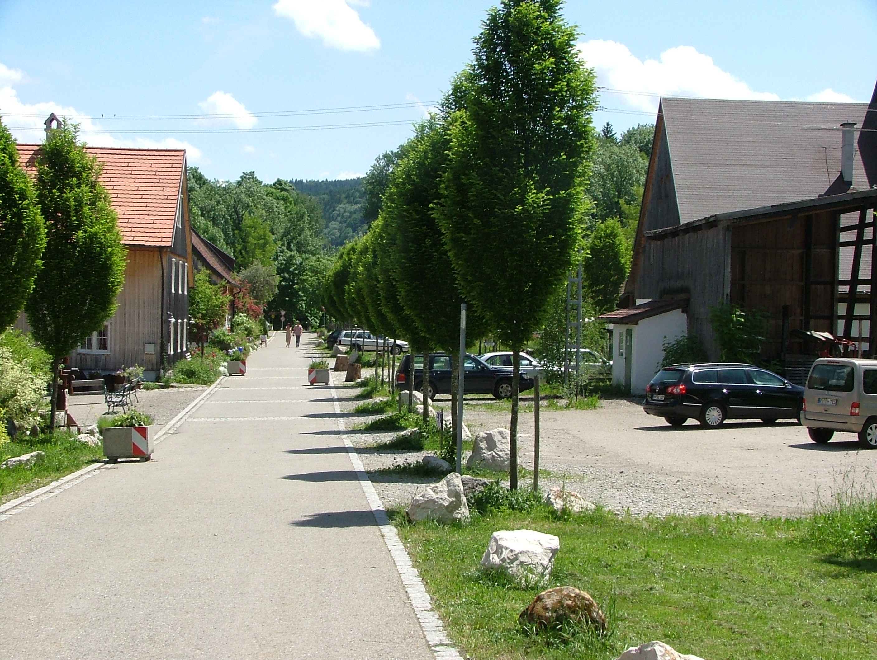 Schmidsfelden